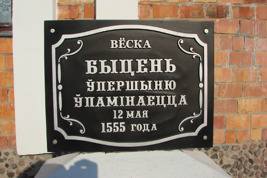 Фото 2012 года